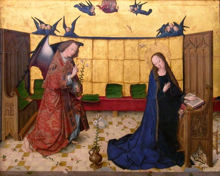 Annunciation